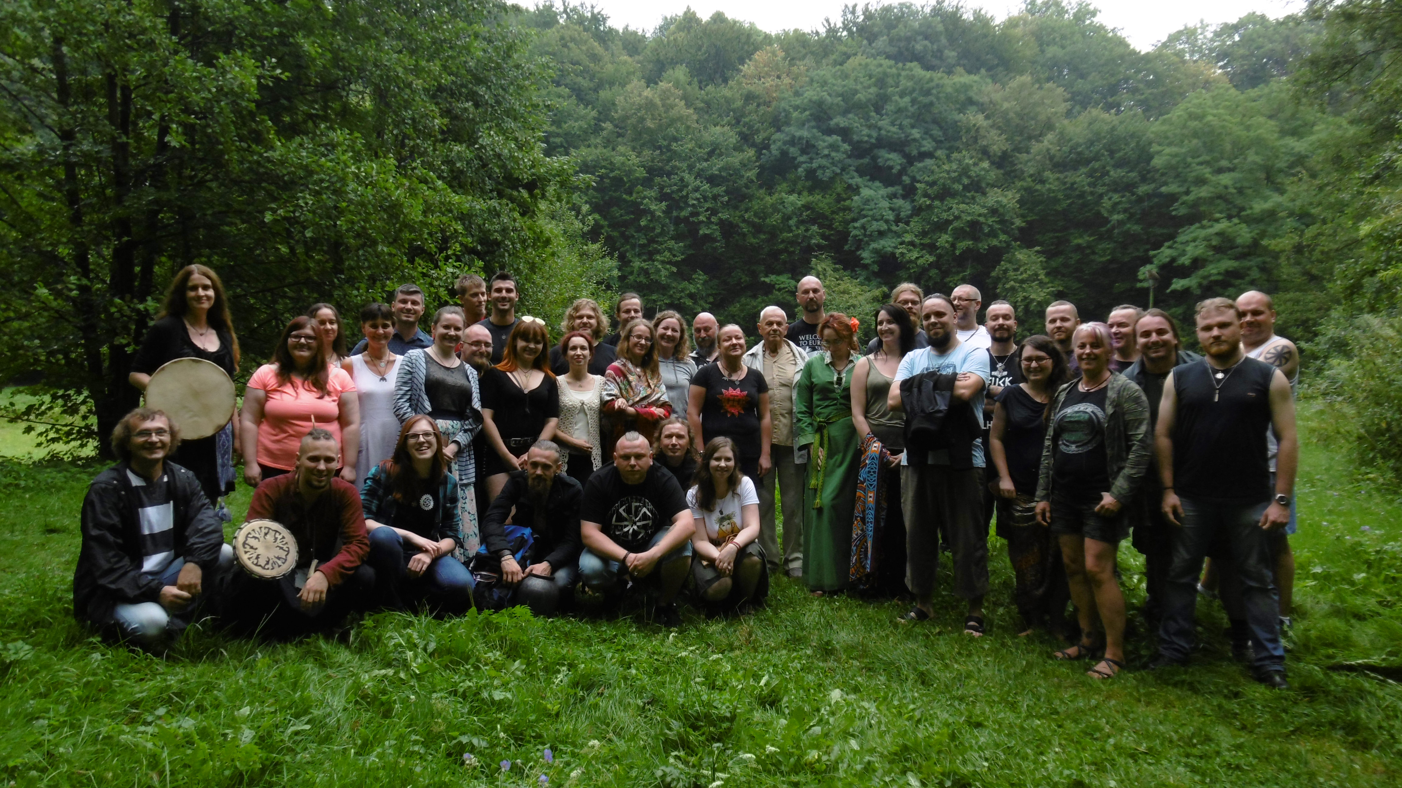 V Ogólnopolski Zjazd i Wiec Rodzimowierczy w Korzkwi k/Krakowa, 4-6 sierpnia 2017.